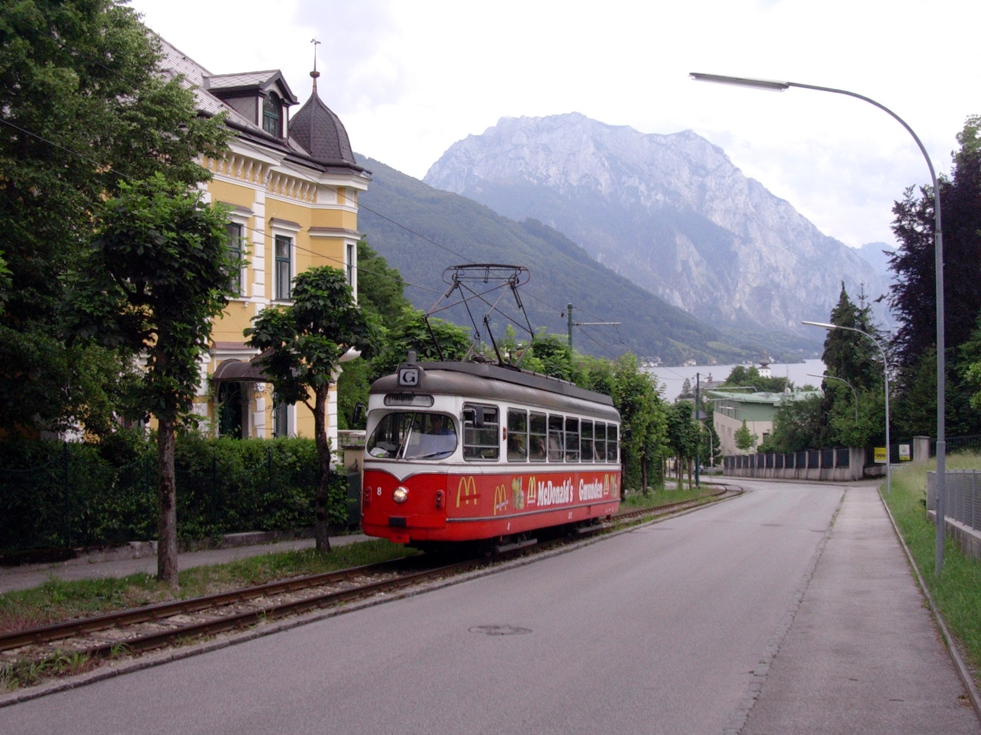 GM 8 in der Steigung